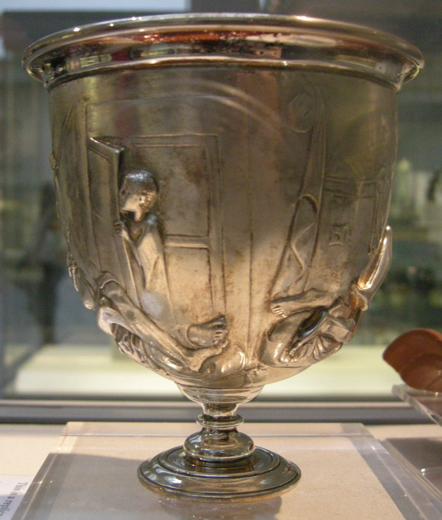 Coppa warren, 5-15 dc.